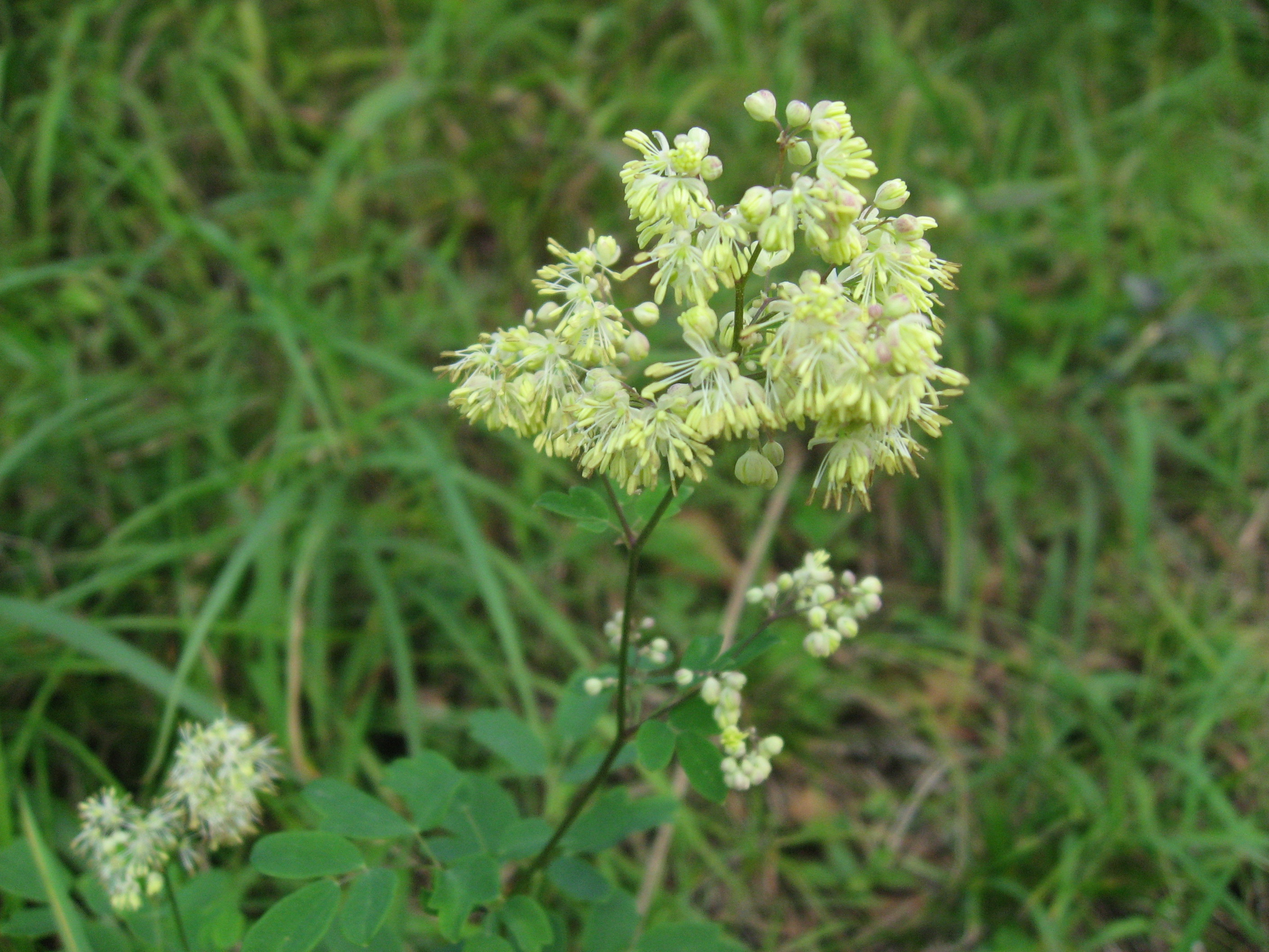 アキカラマツ Thalictrum minus var. hypoleucum